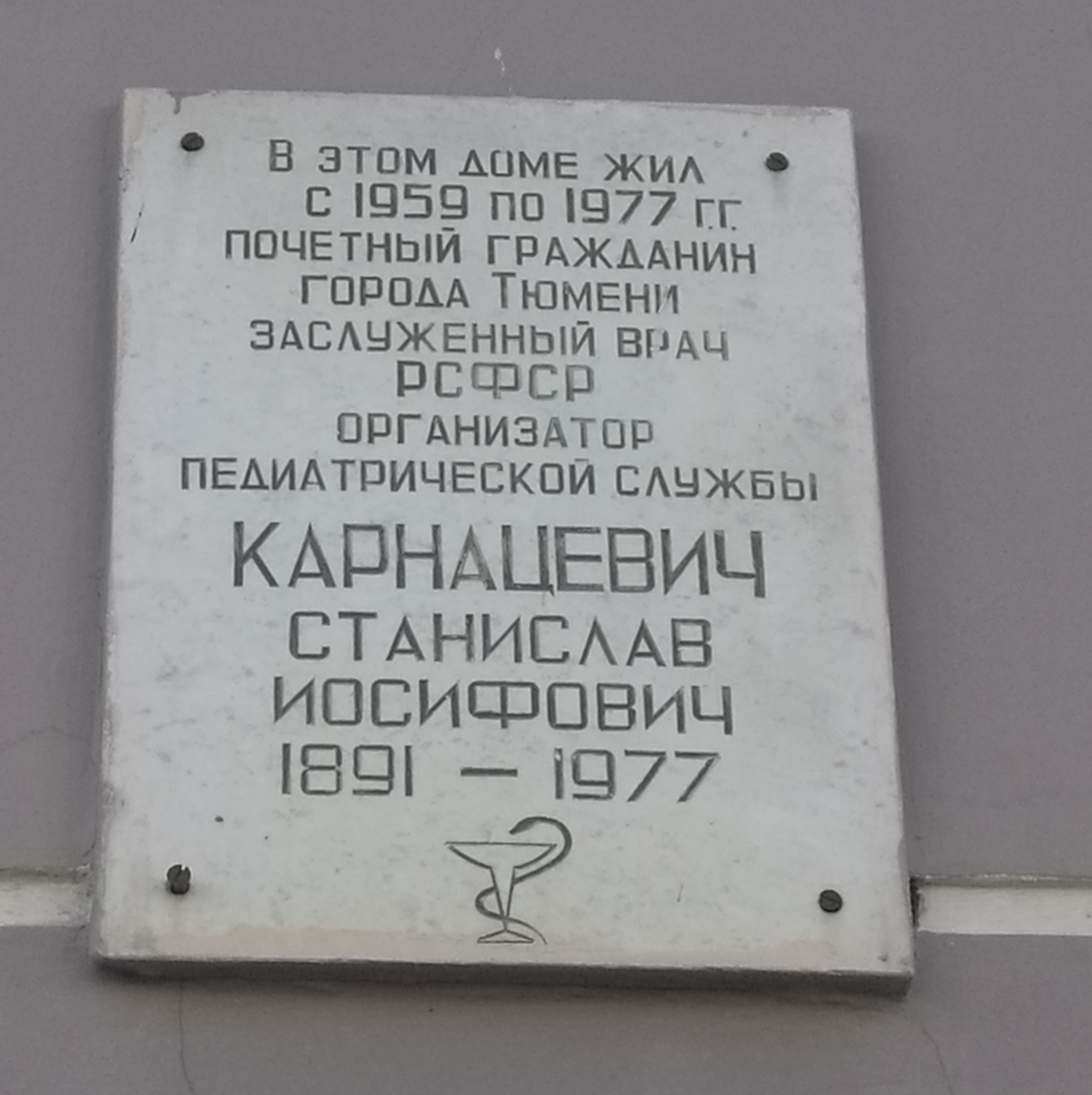 Memortabulo al Stanislav Karnaceviĉ en strato Respubliko. Tjumeno, Rusio.